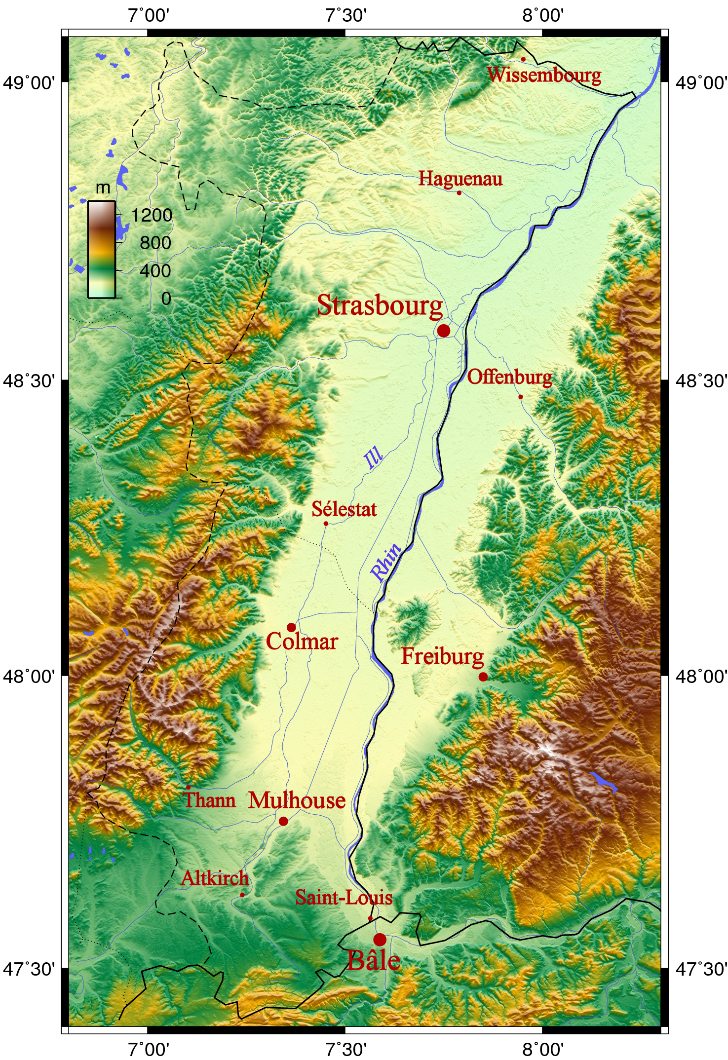 Carte topographique de l'Alsace et de la plaine d'effondrement rhénane.